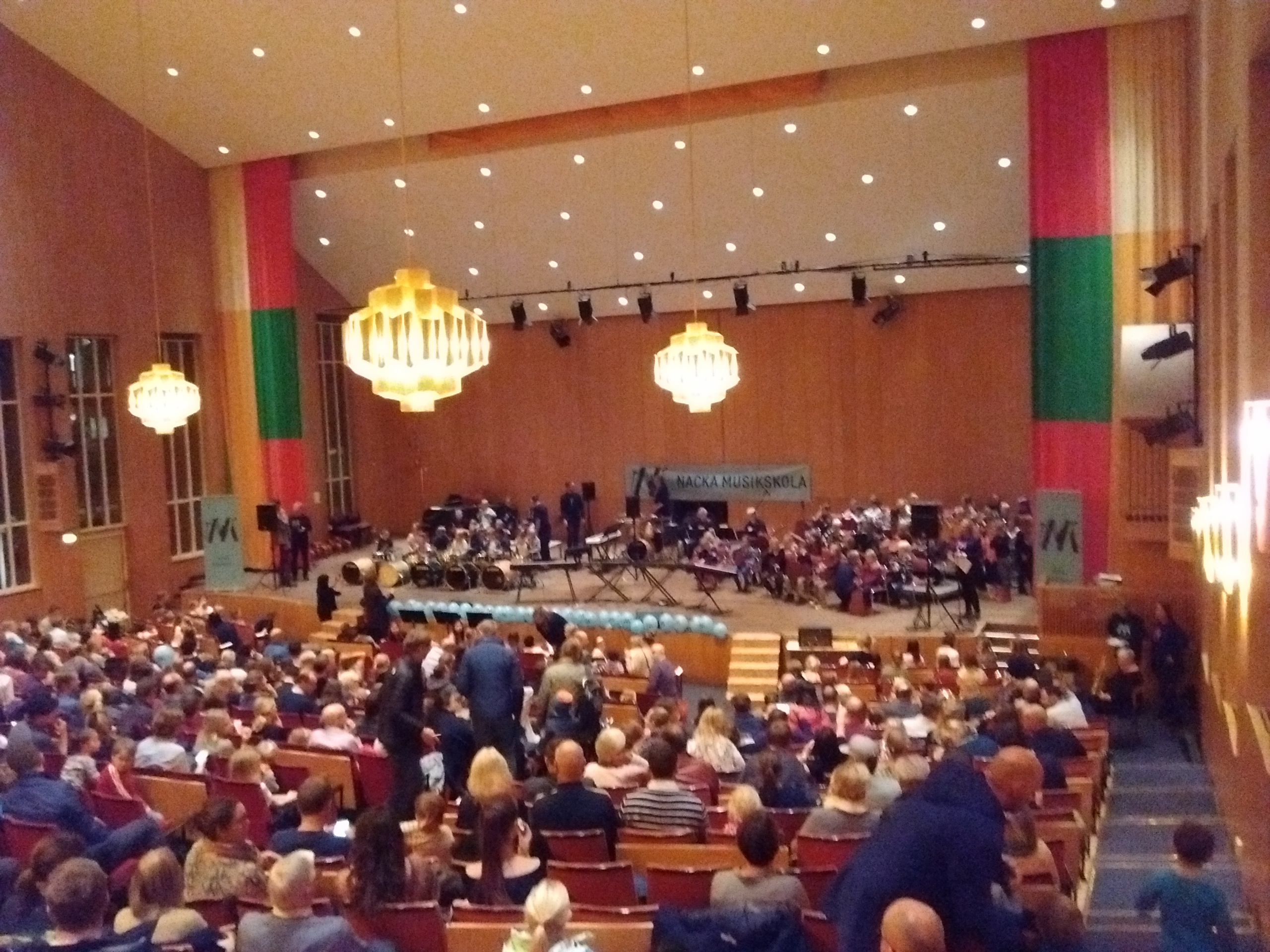 Nyborjarkonsert 2016